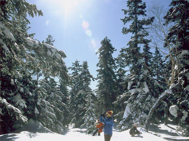 Bosque de coniferos en Shin-Hodaka, Sierra Hida, Japon. Mayor parte de los coniferos son Abies veitchii y Abies mariesii. Y quizas contiene Picea jezoensis subsp. hondoensis y Tsuga diversifolia. Foto por usario Inti-sol simismo en febrero de 2006. 北アルプス新穂高温泉の針葉樹林。大部分はシラビソとオオシラビソ、一部トウヒとコメツガを伴う。投稿者が2006年2月に撮影。